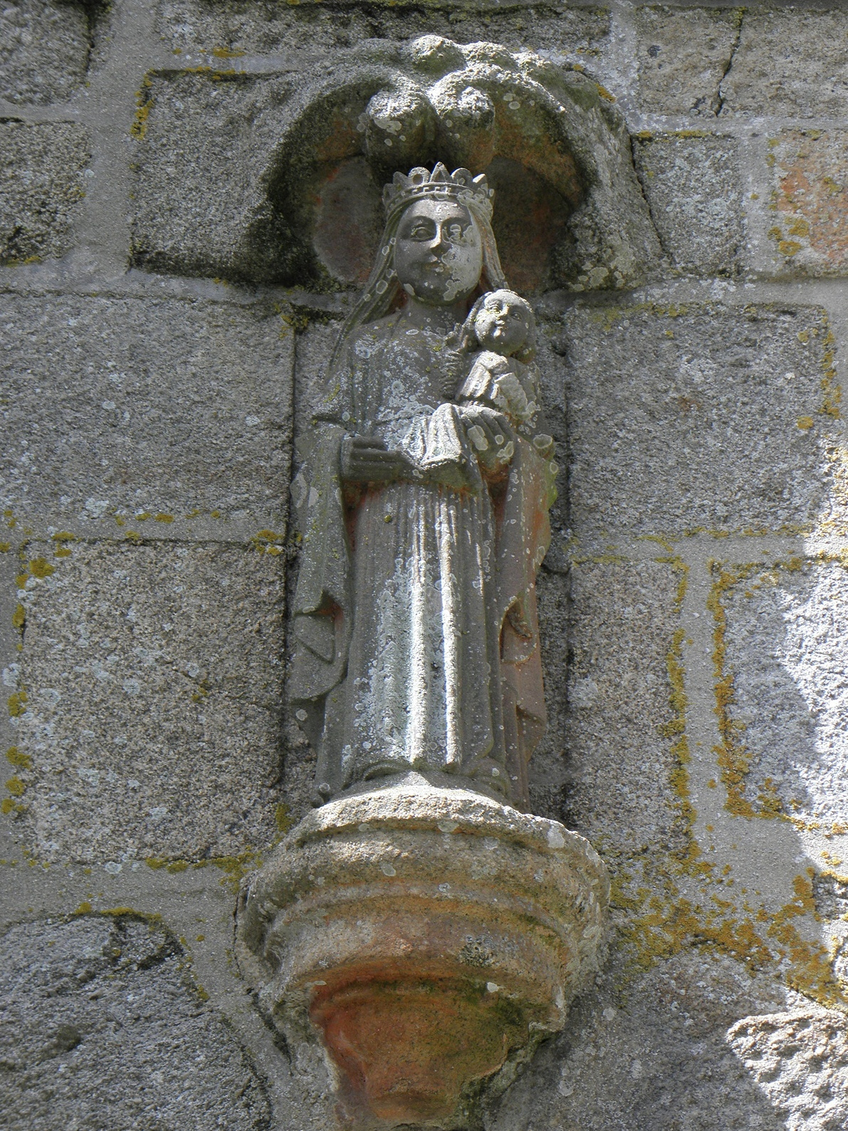 Vierge à l'Enfant au mur méridionale de la tour-clocher de la chapelle de Loc-Maria-Lann en Plabennec (29).